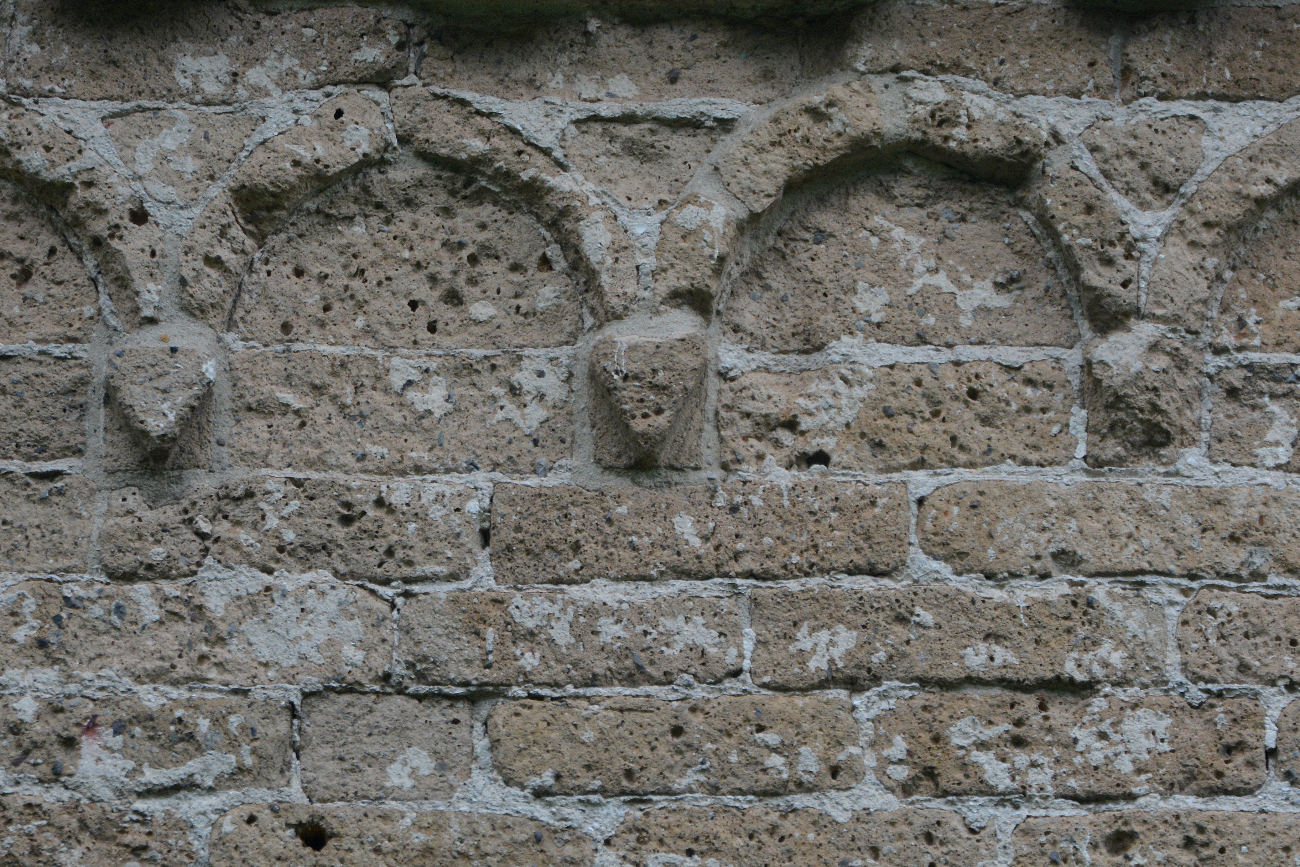 Oudkerk, Pauluskerk, rondboogfries